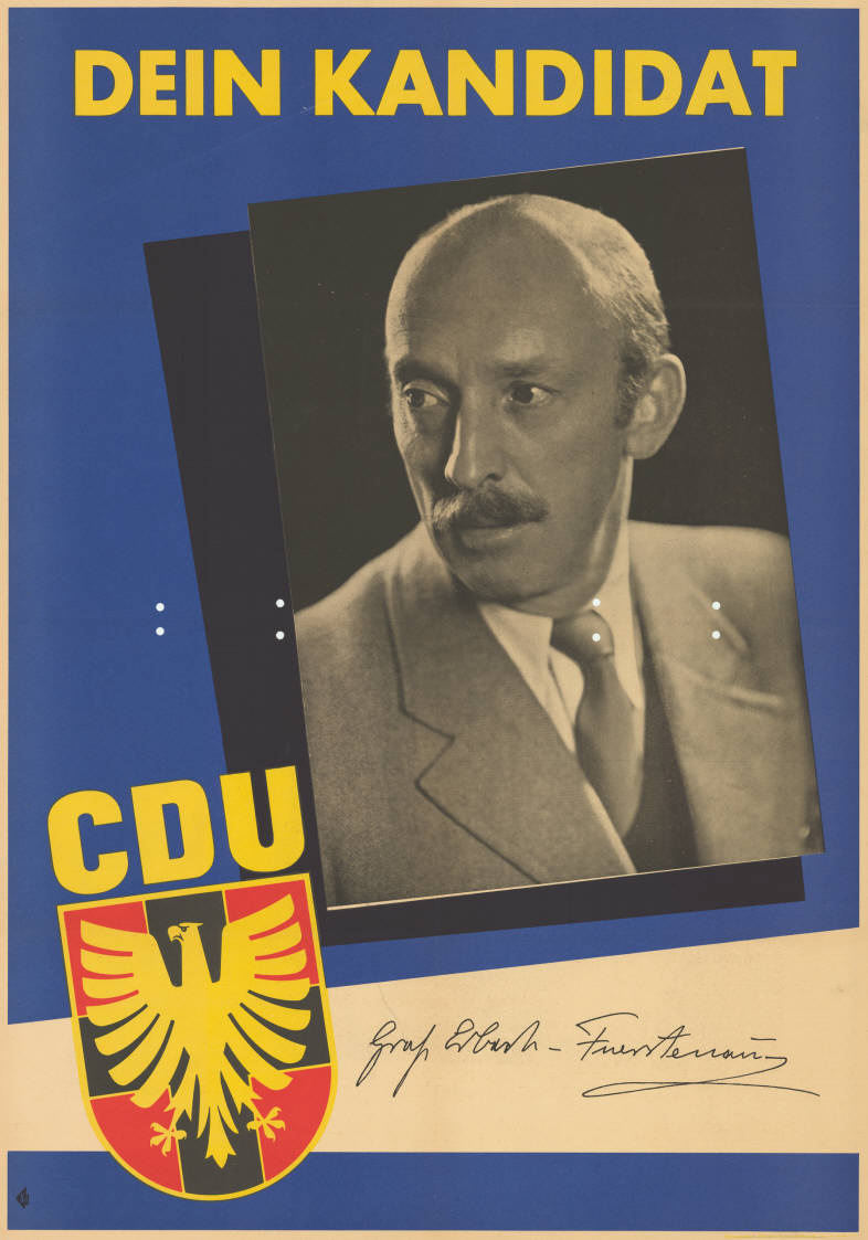 Dein Kandidat CDU Graf Alfred zu Erbach-FürstenauAbbildung:Porträtfoto - CDU-LogoPlakatart:Kandidaten-/Personenplakat mit PorträtAuftraggeber:CDU-Bundesgeschäftsstelle (unleserlich)Drucker_Druckart_Druckort:KVD, KölnObjekt-Signatur:10-007 : 101Bestand:Landtagswahlplakate Hessen (10-007)GliederungBestand10-18:Landtagswahlplakate Hessen (10-007) » CDULizenz:KAS/ACDP 10-007 : 101 CC-BY-SA 3.0 DE